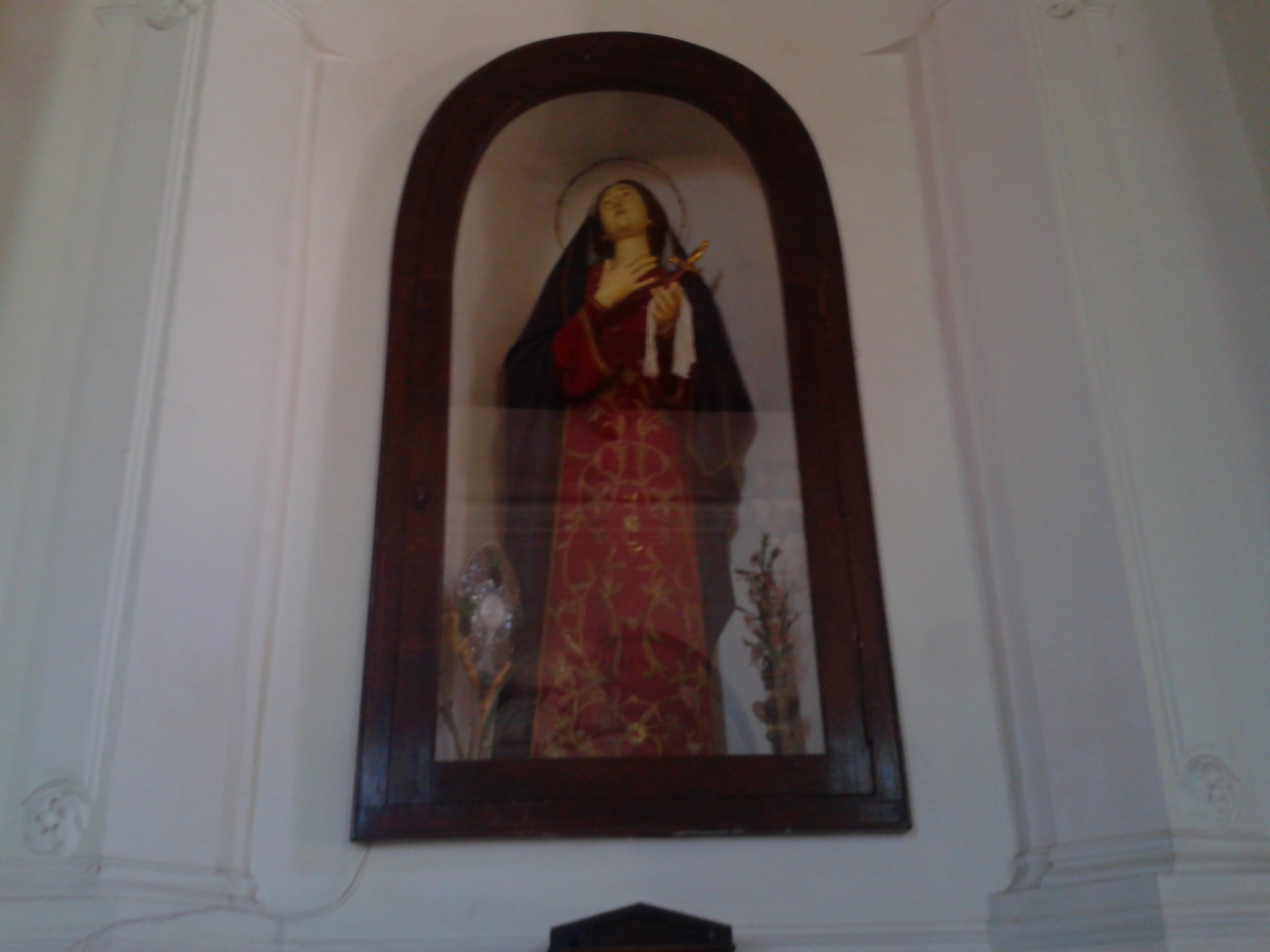 Addolorata chiesa del Crocifisso (Palmi)